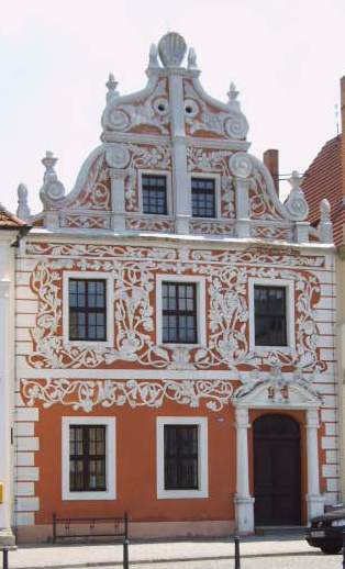 Haus am Markt von Luckau, Land Brandenburg, Deutschland Bild aufgenommen am 25.6.2006 von Olaf Meister